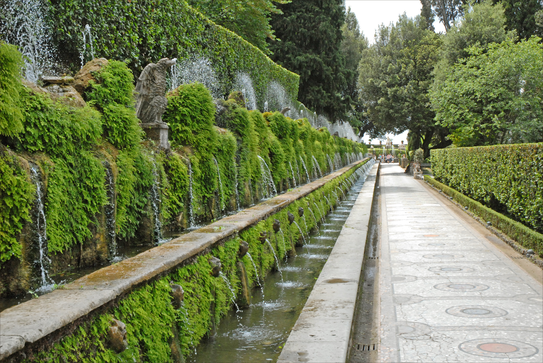 L'allée aux Cent-Fontaines ou "Viale delle Cento Fontane" est l'une des perspectives les plus célèbres du jardin de la villa d'Este, Elle comprend plus de 300 fontaines et relie la Rometta ou Petite Rome à la fontana dell'Ovato Trois bassins longs et étroits se superposent. Ils représentent les trois rivières qui arrosent Tivoli: l'Aniene, l'Albueno et l'Erculaneo. _______________ En 1550, le cardinal Hippolyte II d'Este décida de se retirer à Tivoli (à 30 Km de Rome) où il se fit construire une villa d'agrément, sur l'emplacement d'un couvent de Bénédictins. La villa est devenue célèbre pour ses jardins et ses fontaines qui constituent un ensemble unique de 3 hectares, aujourd'hui classé au patrimoine mondial de l'UNESCO. Les anciens appartements de la villa sont visitables. Ils sont décorés de peintures murales de style maniériste, réalisées par des élèves de Girolamo Muziano et Federico Zuccari. L'architecte, maître d'oeuvre de l'aménagement de la villa et des jardins est Pirro Ligorio. Son oeuvre est une des plus éclatantes réussites de la Renaissance et un des premiers "jardins des merveilles" qui a été imité dans toute l'Europe dès sa création. Les jardins restaurés par l'Etat italien font partie des sites incontournables du tourisme dans la région de Rome. le site officiel de la villa d'Este l'article Wikipedia